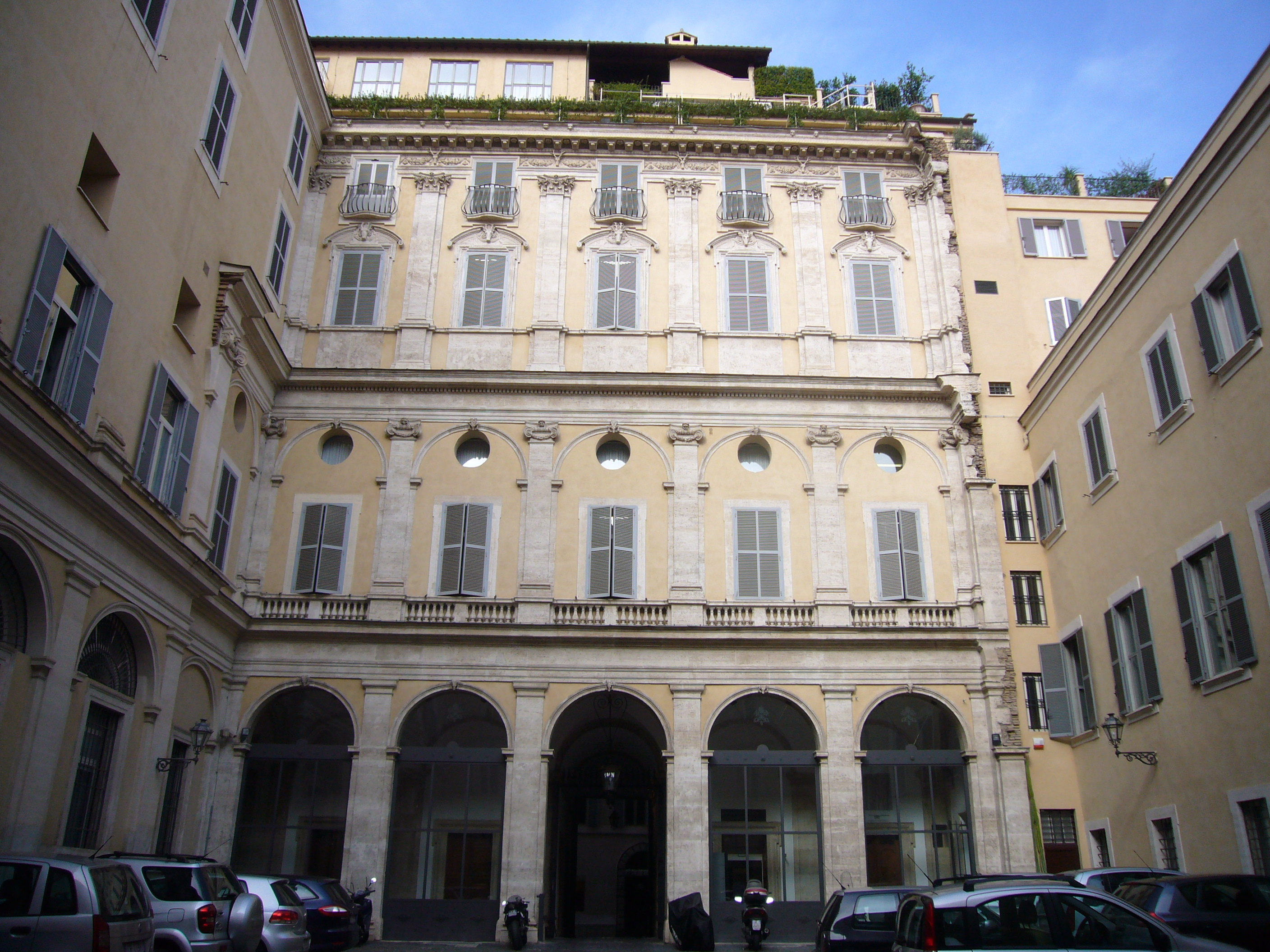 Roma, palazzo Maffei Marescotti oggi del Vicariato, cortile